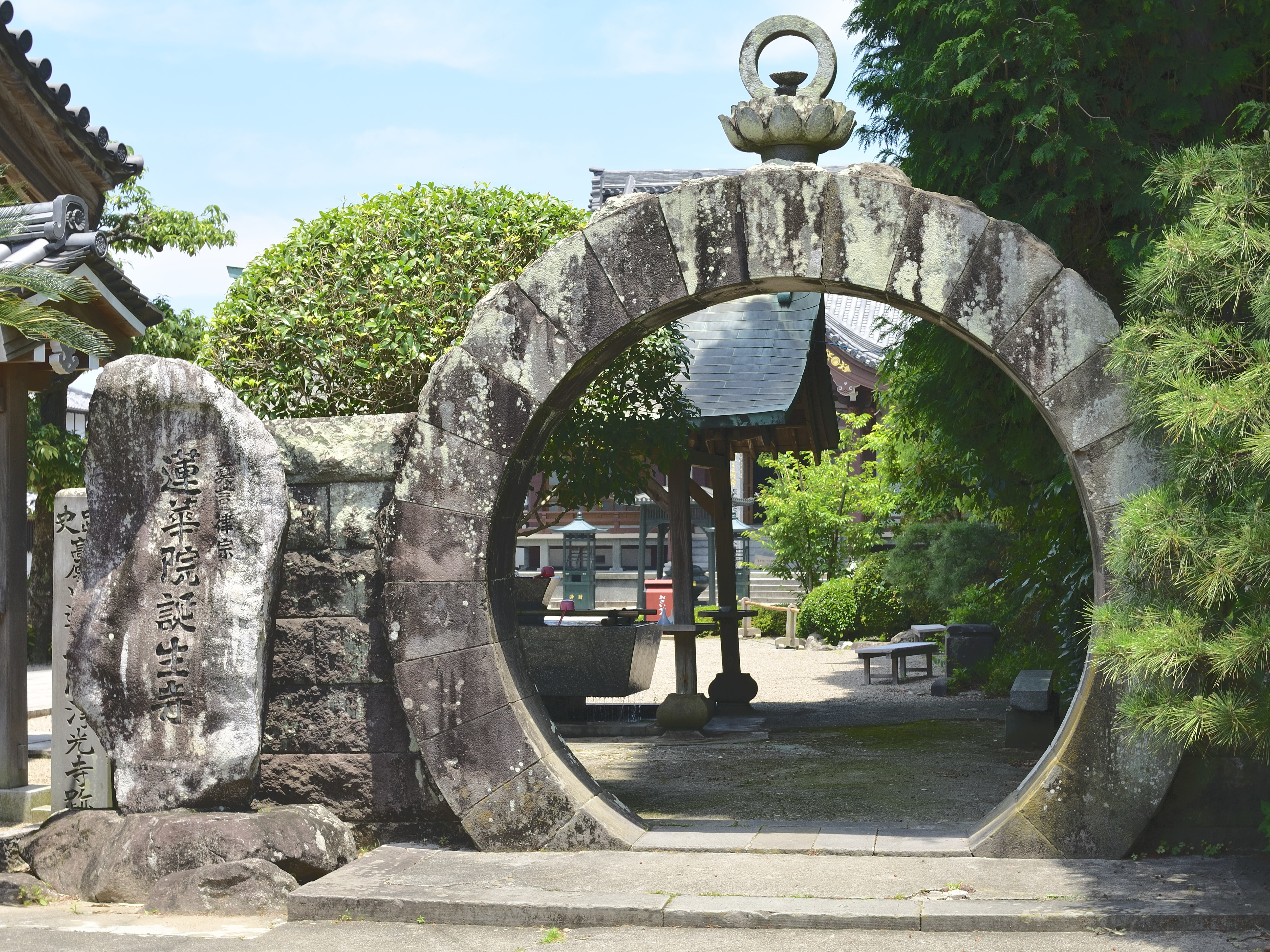 蓮華院誕生寺の円門